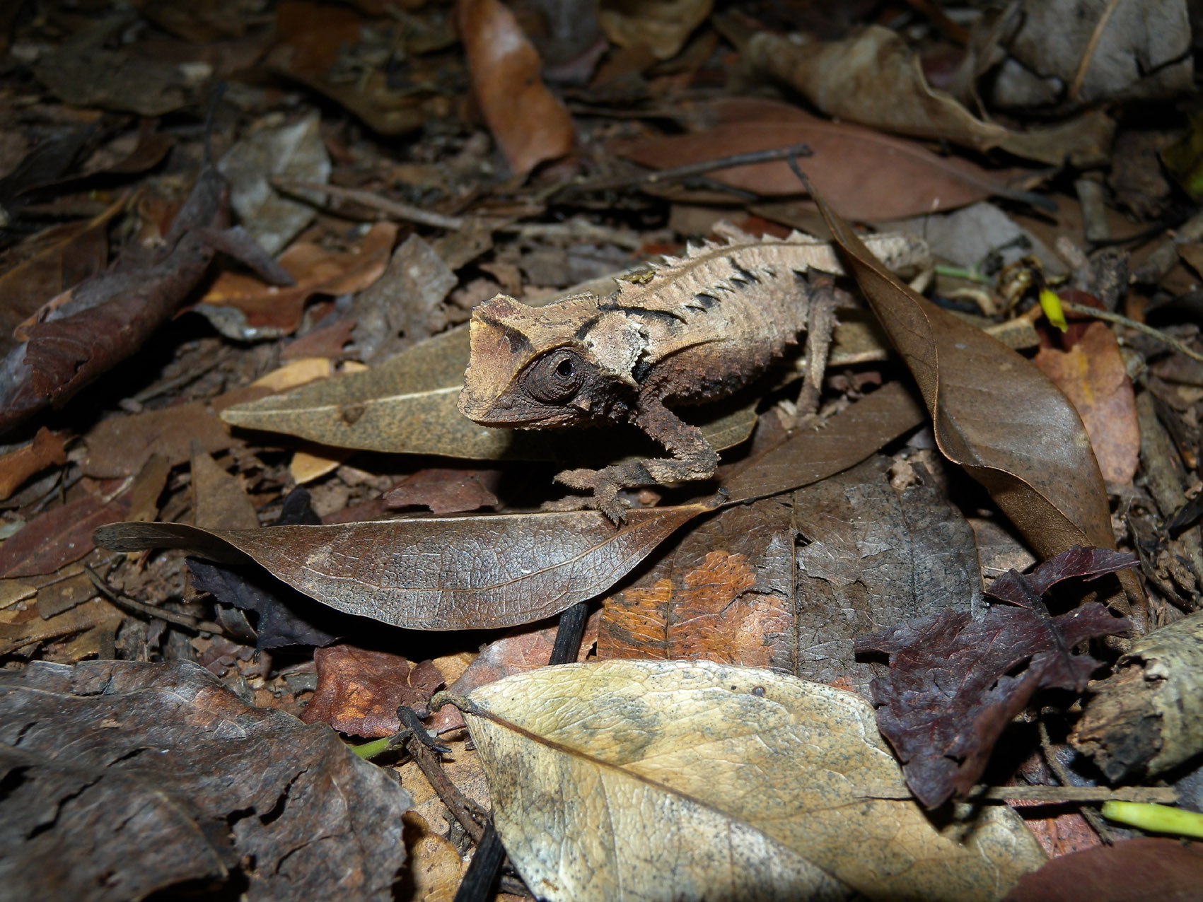 Brookesia decaryi, Ankarafantsika National Park, Madagascar